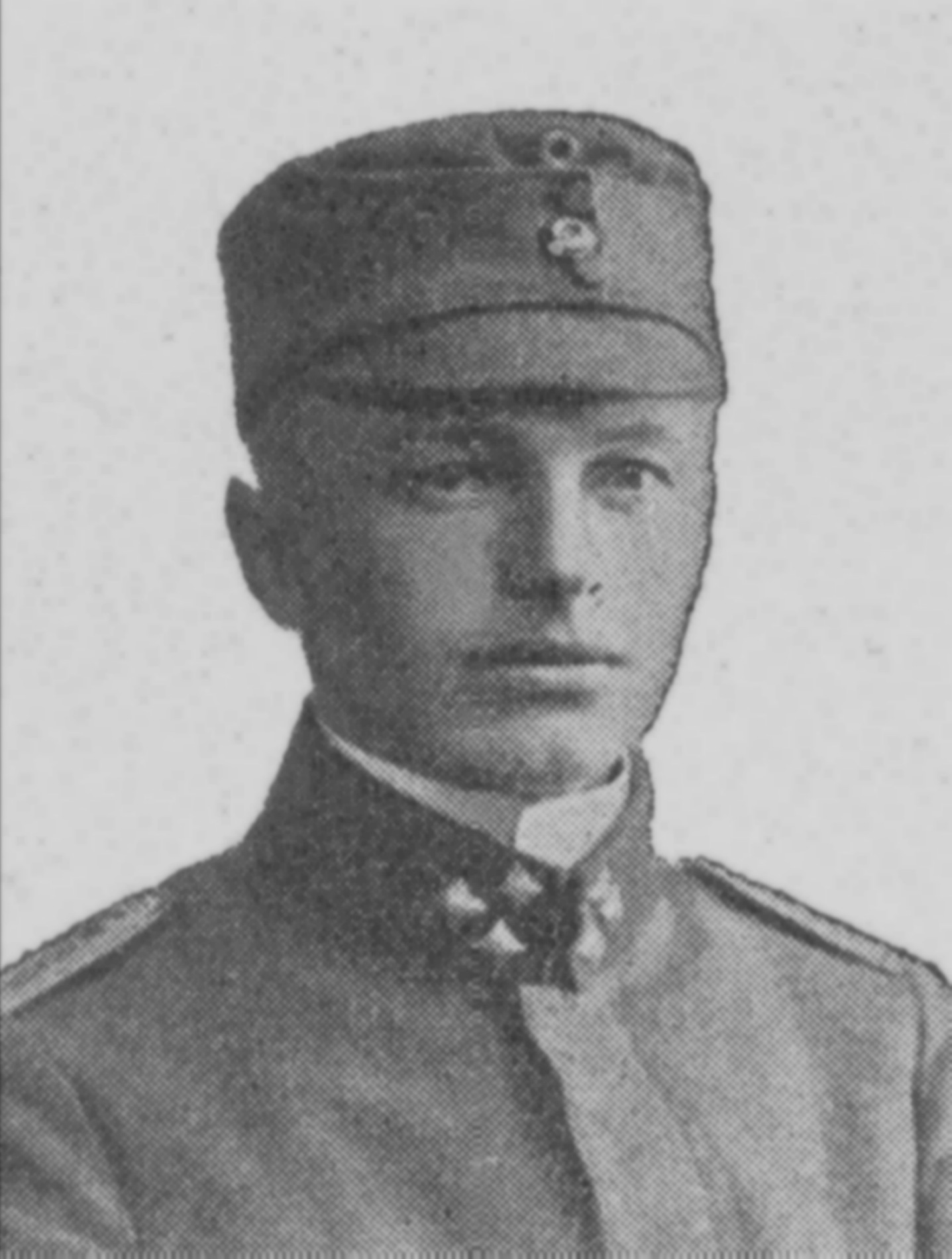 Description